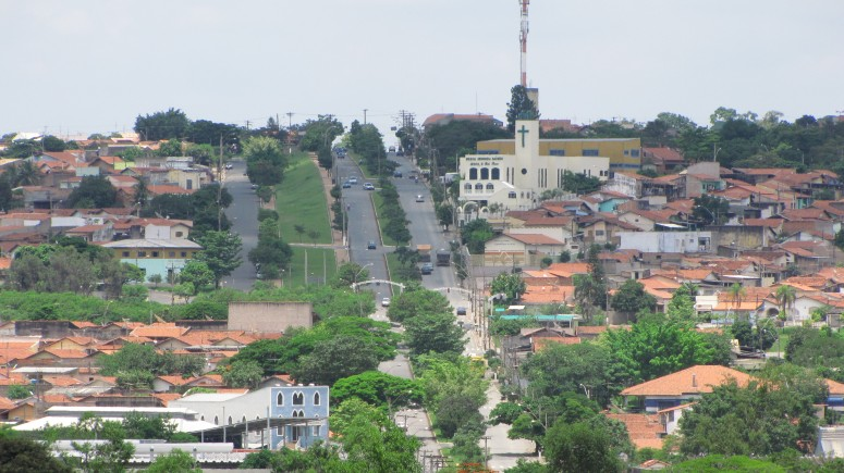 Avenida Antônio Batista Piva, e vista do bairro Monte Alegre, em Paulínia.